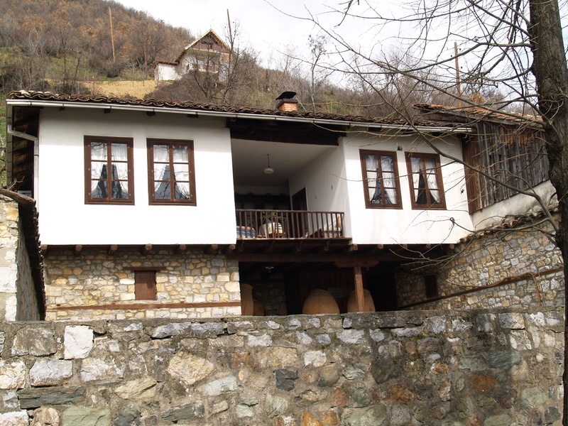 Музеј на КПМ